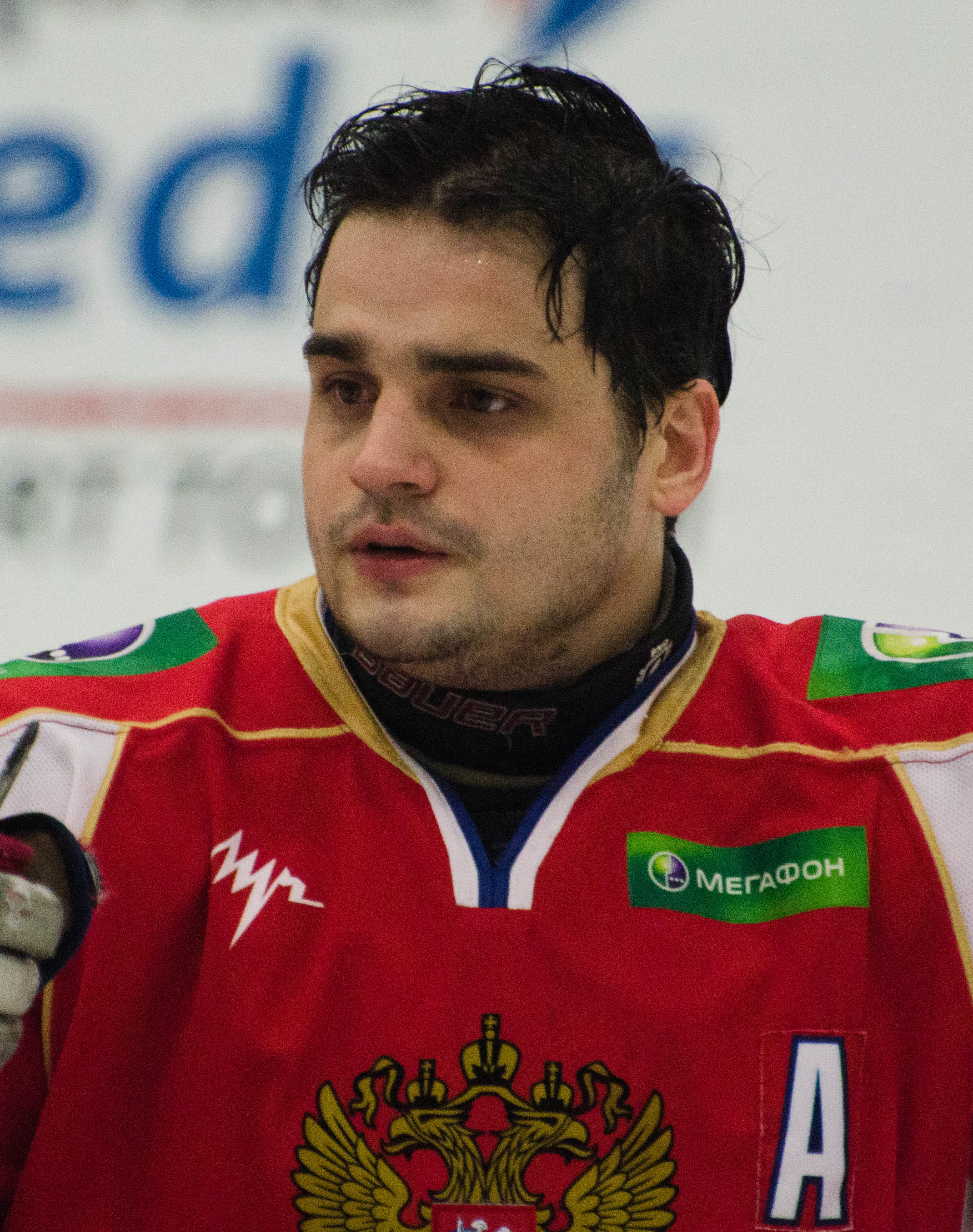 Vladimir Litvinenko, 2015